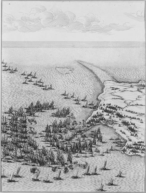 Siege_de_la_citadelle_de_Saint_Martin_dans_l'Ile_de_Re_par_Louis_XIII_en_1625_planche_1_Jacques_Callot. Tentatives de prise de st-Martin en Ré par les anglais le 18 spt et le 27 oct.